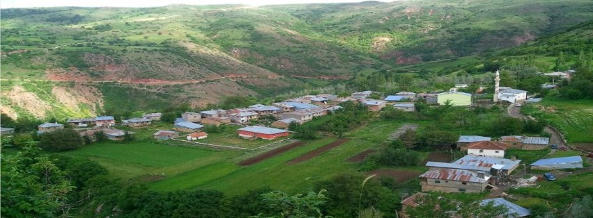 Kipcak Koyu yukaridan cekim klajsdklaskldnklasndklndslfkndsf